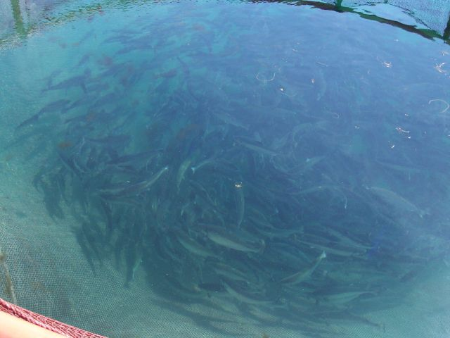 Lachszucht in Norwegen, eigenes Bild